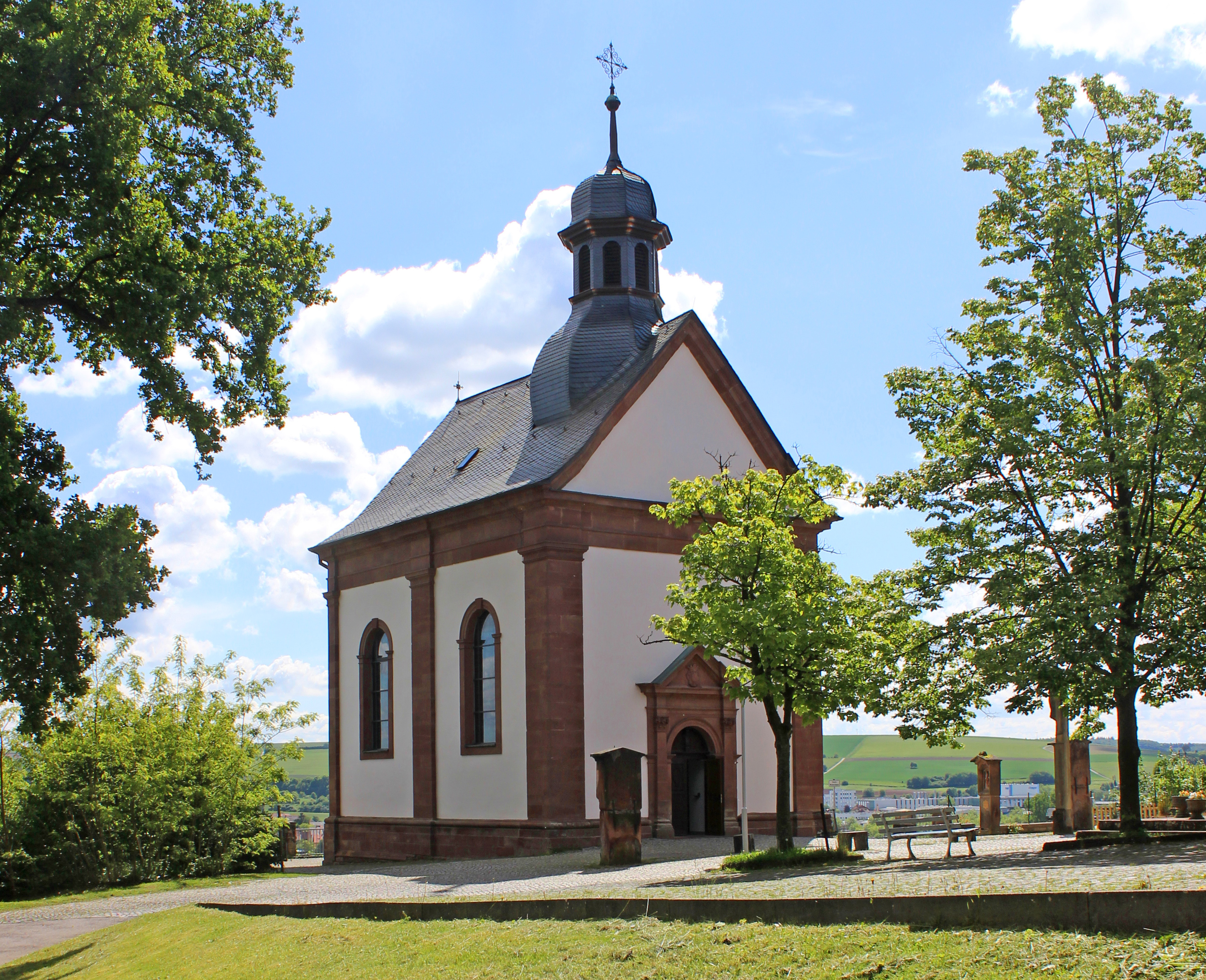 Die Heilig-Kreuz-Kapelle in Blieskastel, Saarpfalz-Kreis, Saarland.